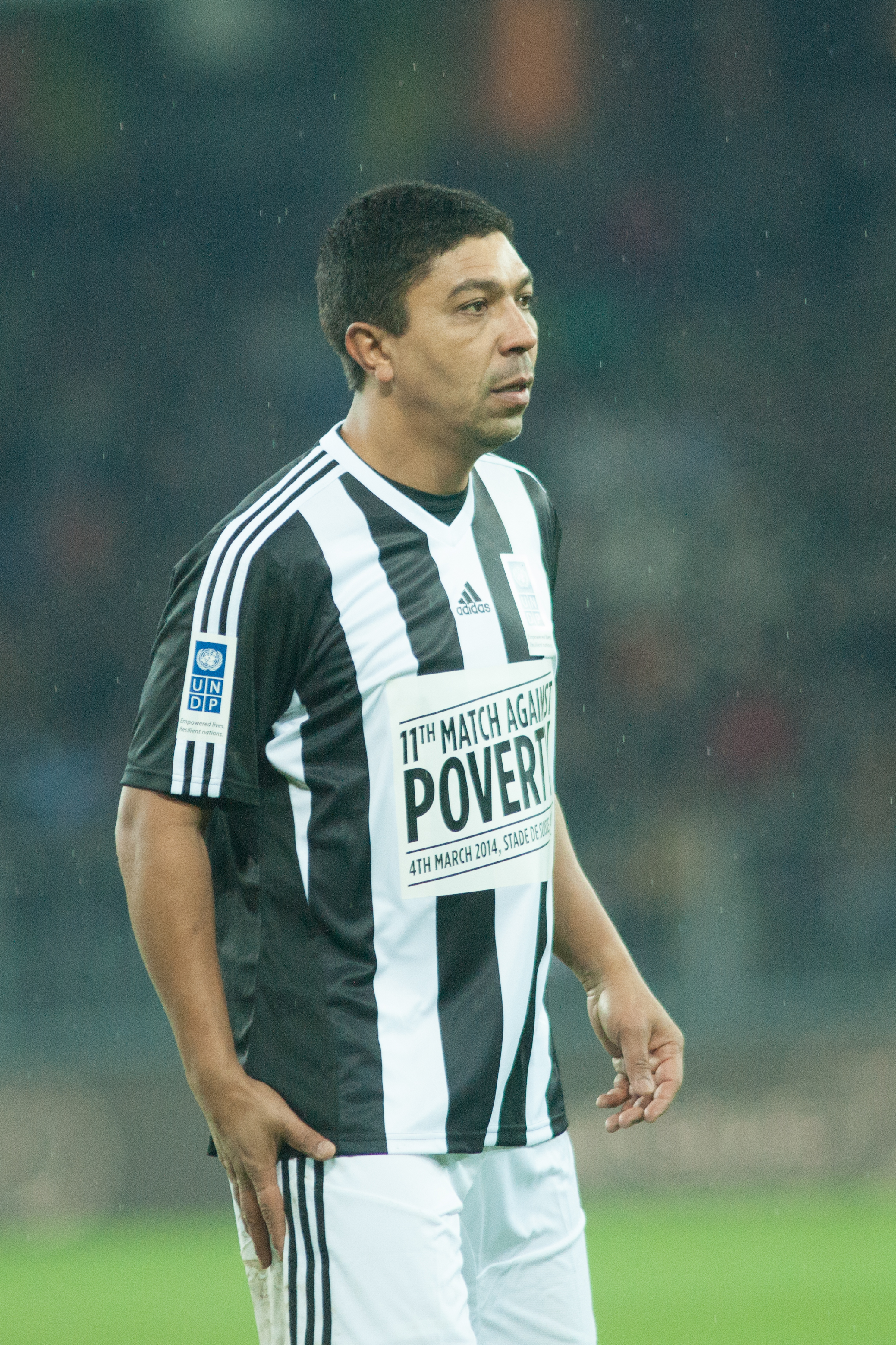 Football against poverty 2014 - Giovane Élber